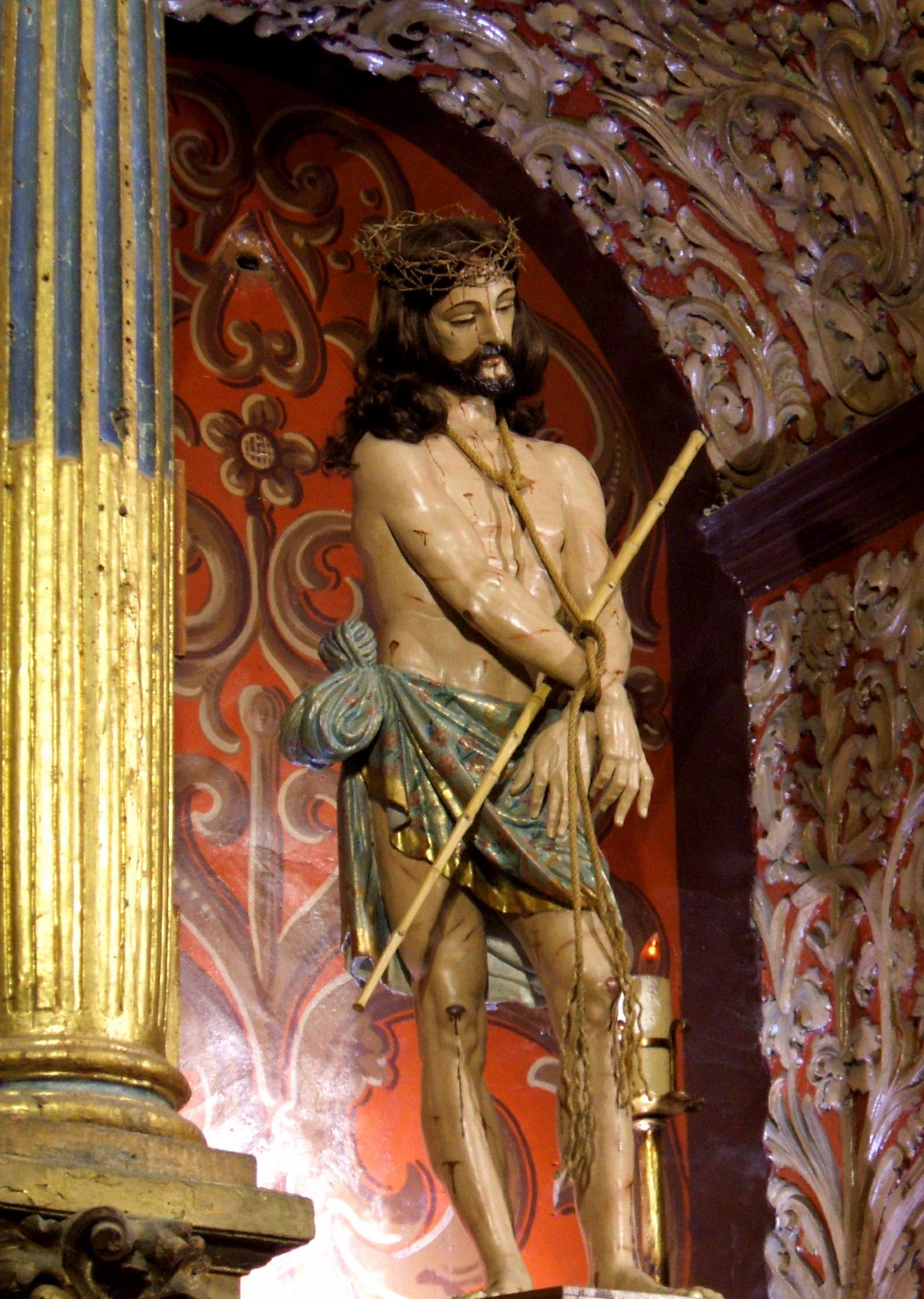 Iglesia del Salvador (Baeza)